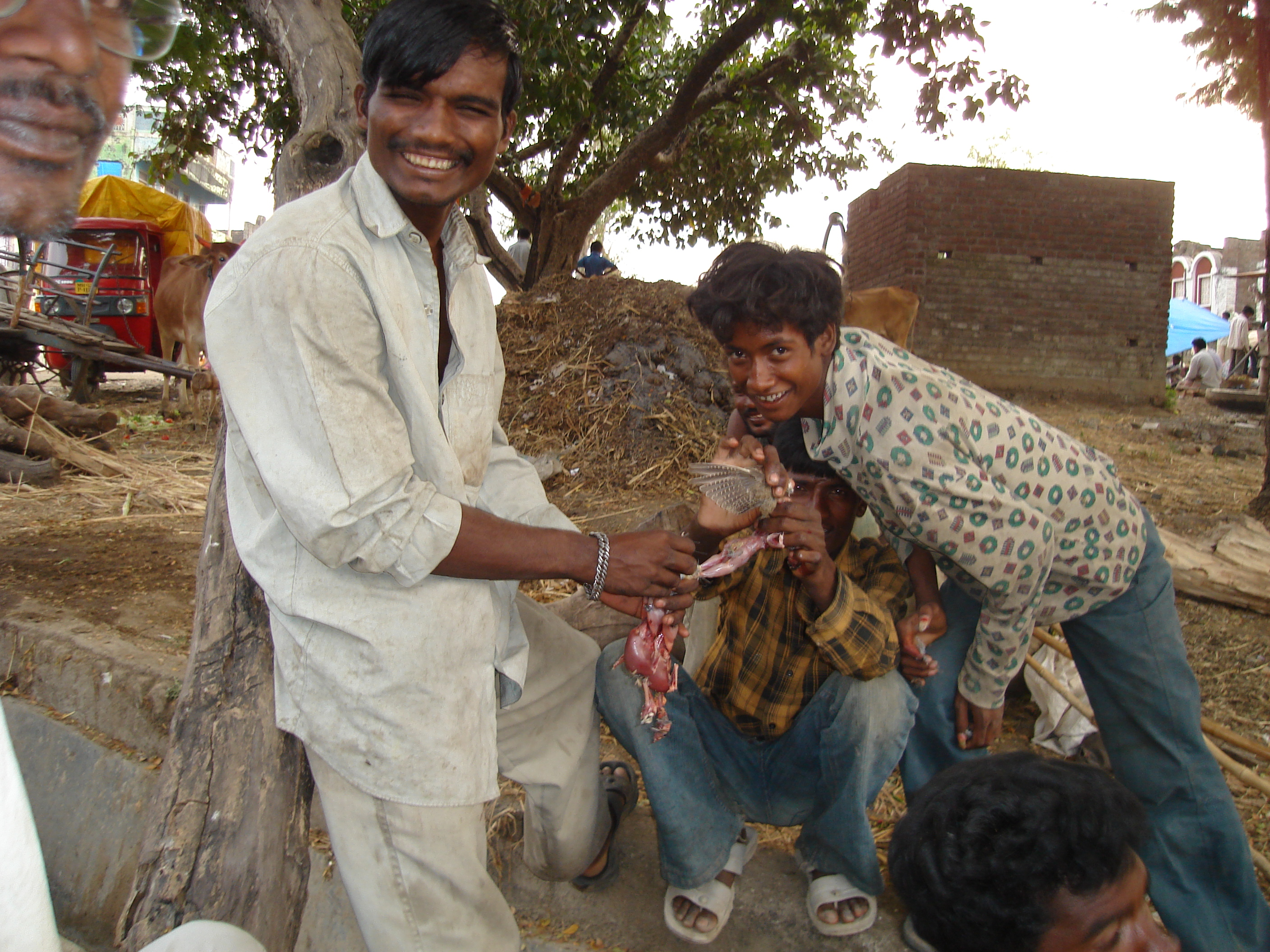 फासेपारधी